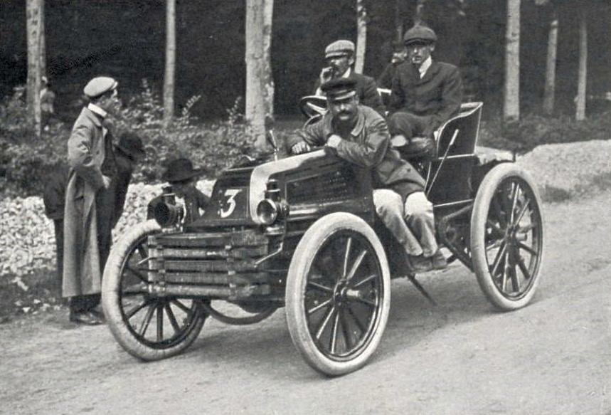 La Mors 24 hp d'Alfred Levegh, victorieuse de Paris-Toulouse-Paris 1900.